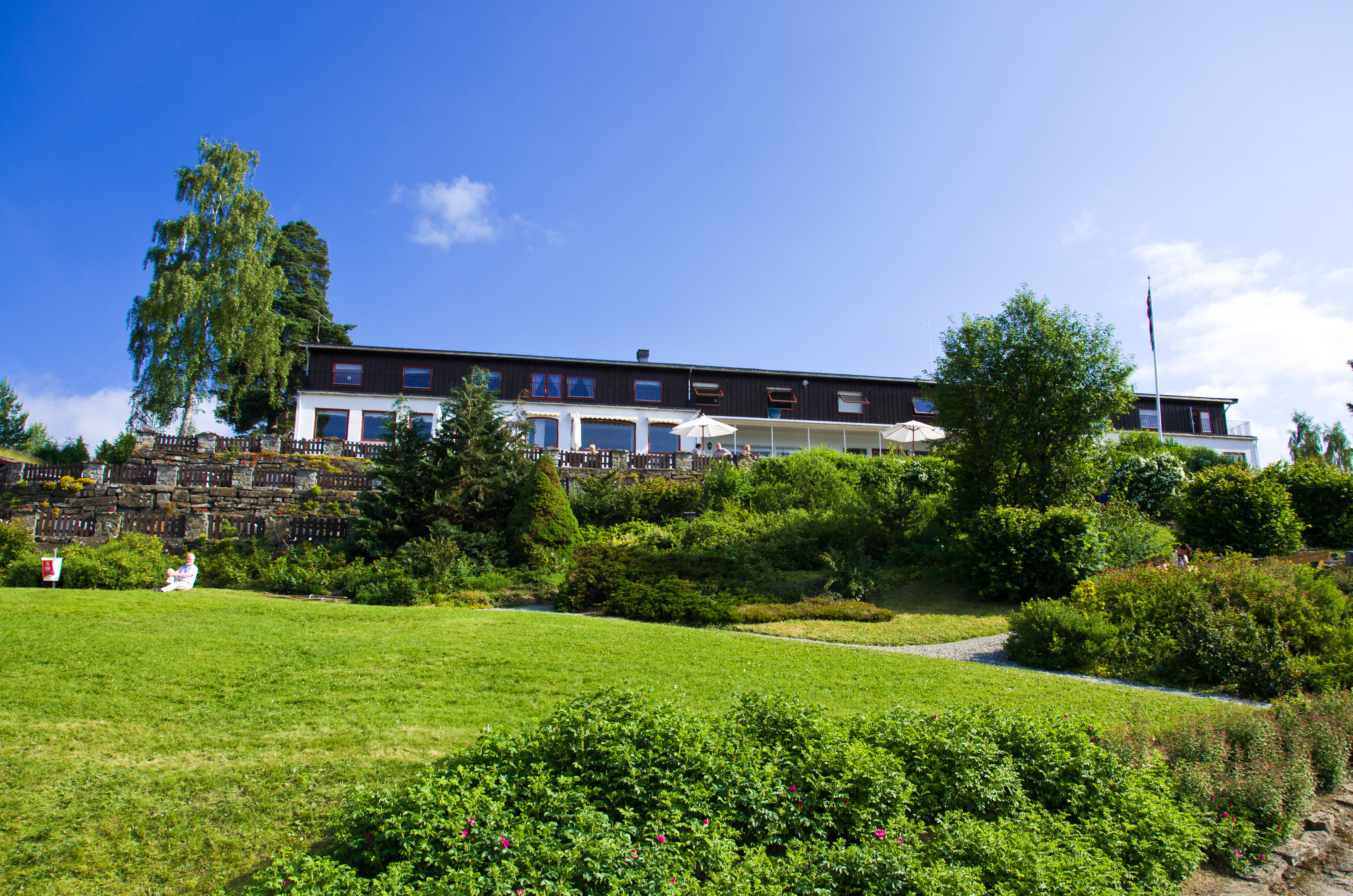 Hedmarktoppen kafeteria og folkehøyskole, i Hamar, Hedmark, Norge